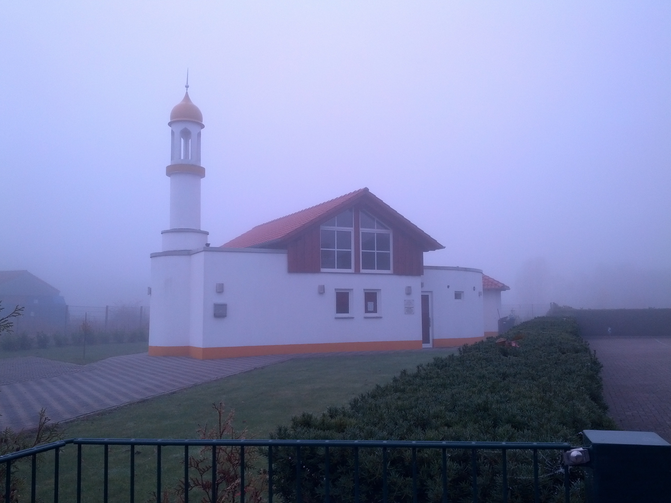 Moschee in Stood